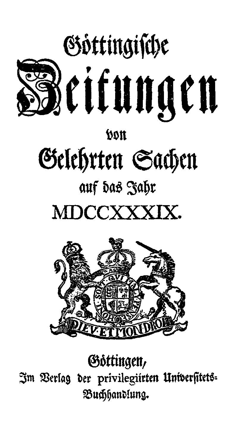 Göttingische Zeitungen 1739, s. Göttingische Gelehrte Anzeigen